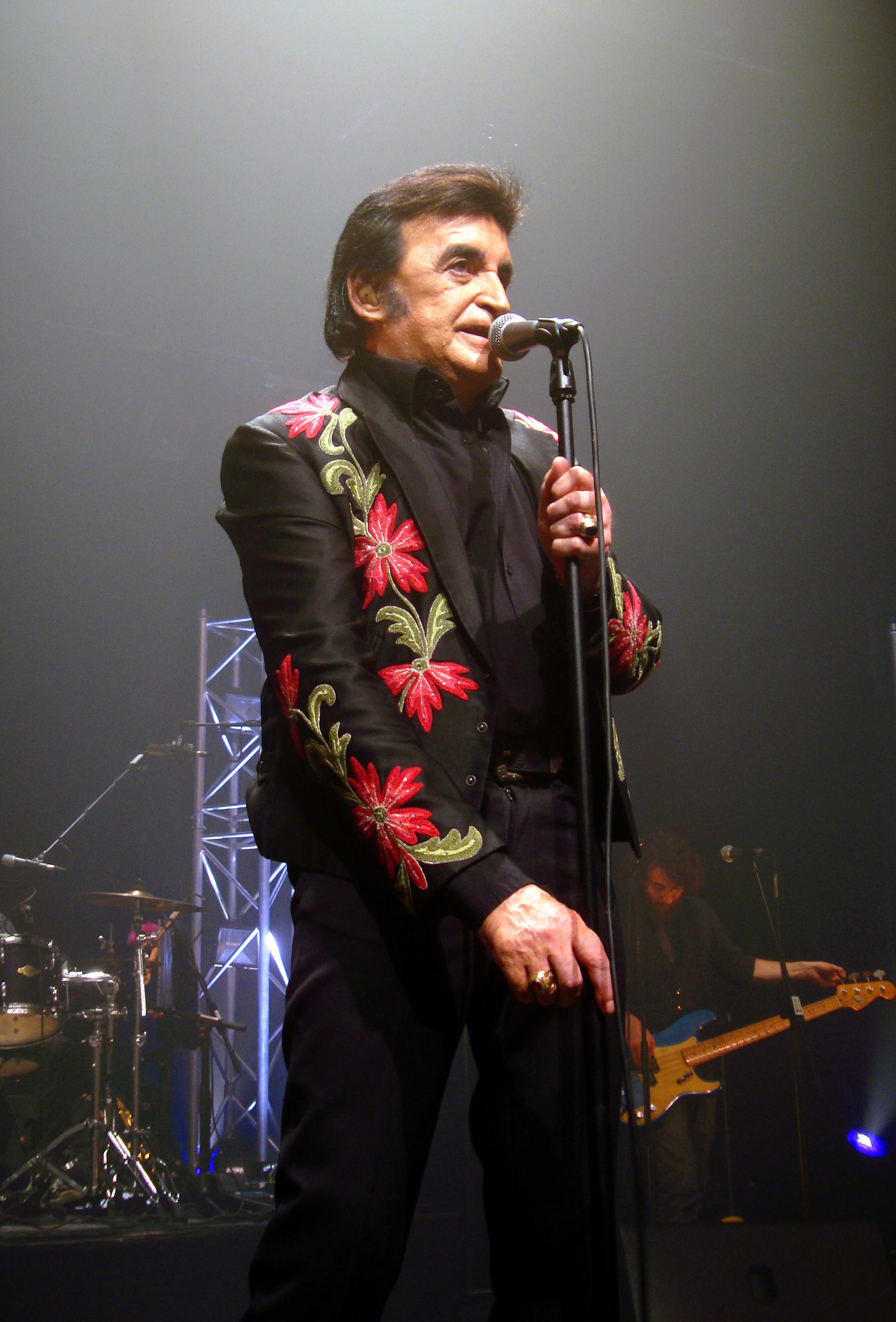 Dick sur scène, le charisme personnifié.